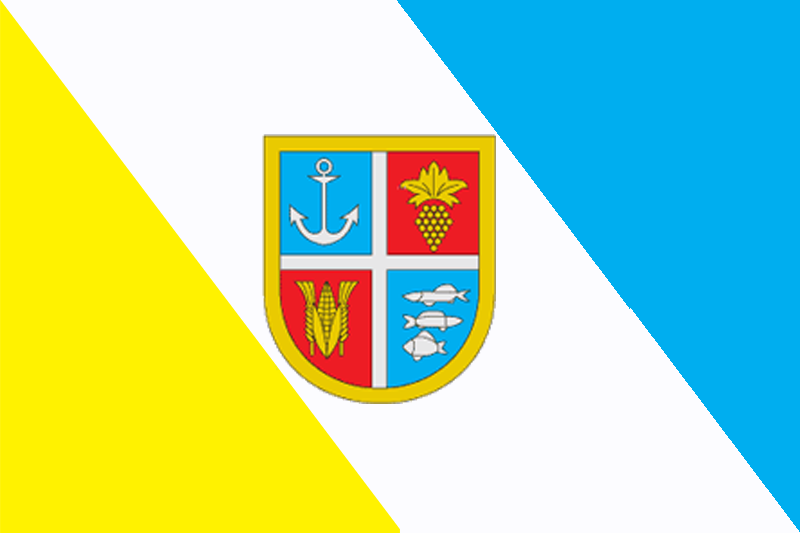 Прапор Ренійського району